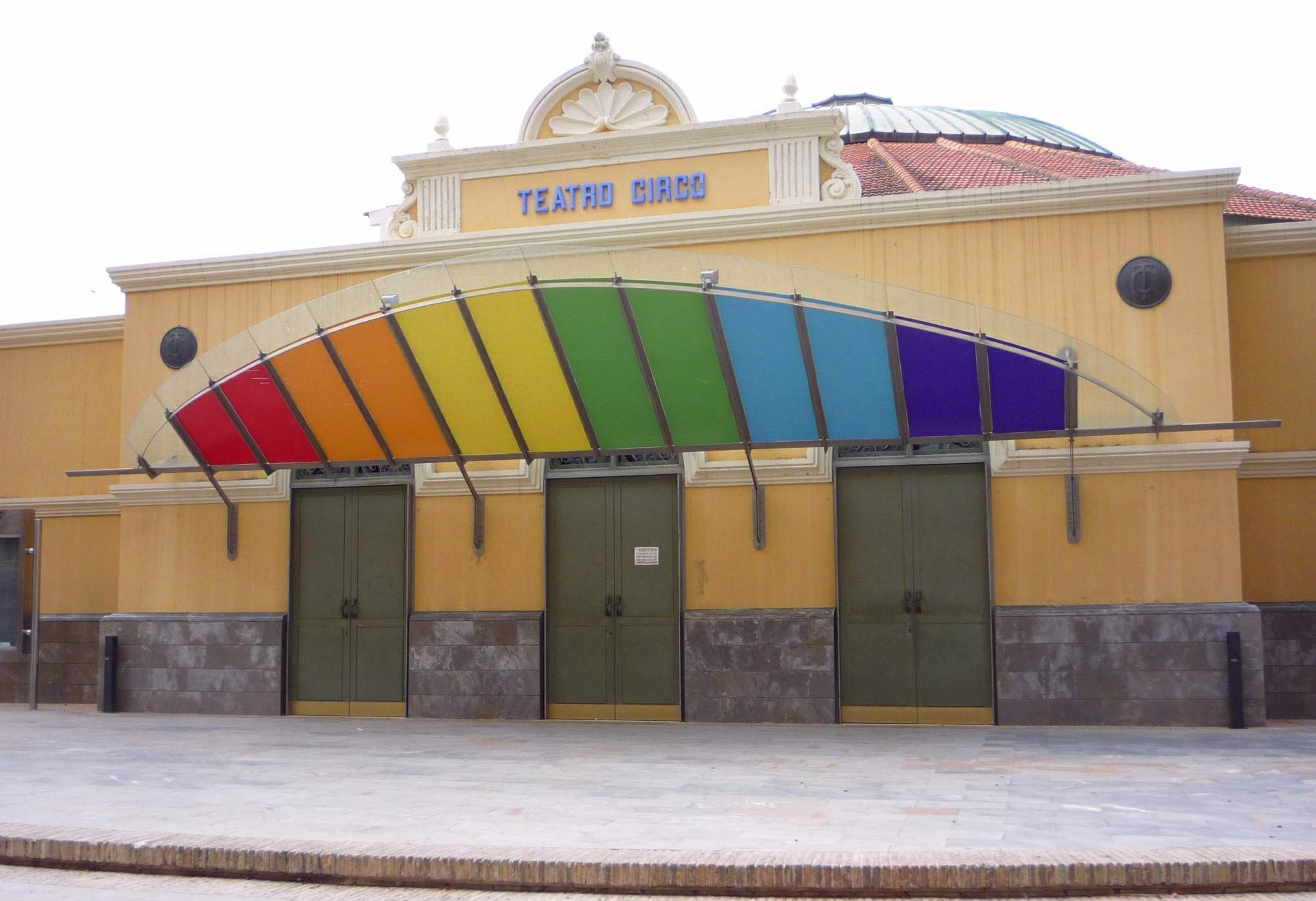 Teatro Circo Atanasio Díe Marín (Orihuela)